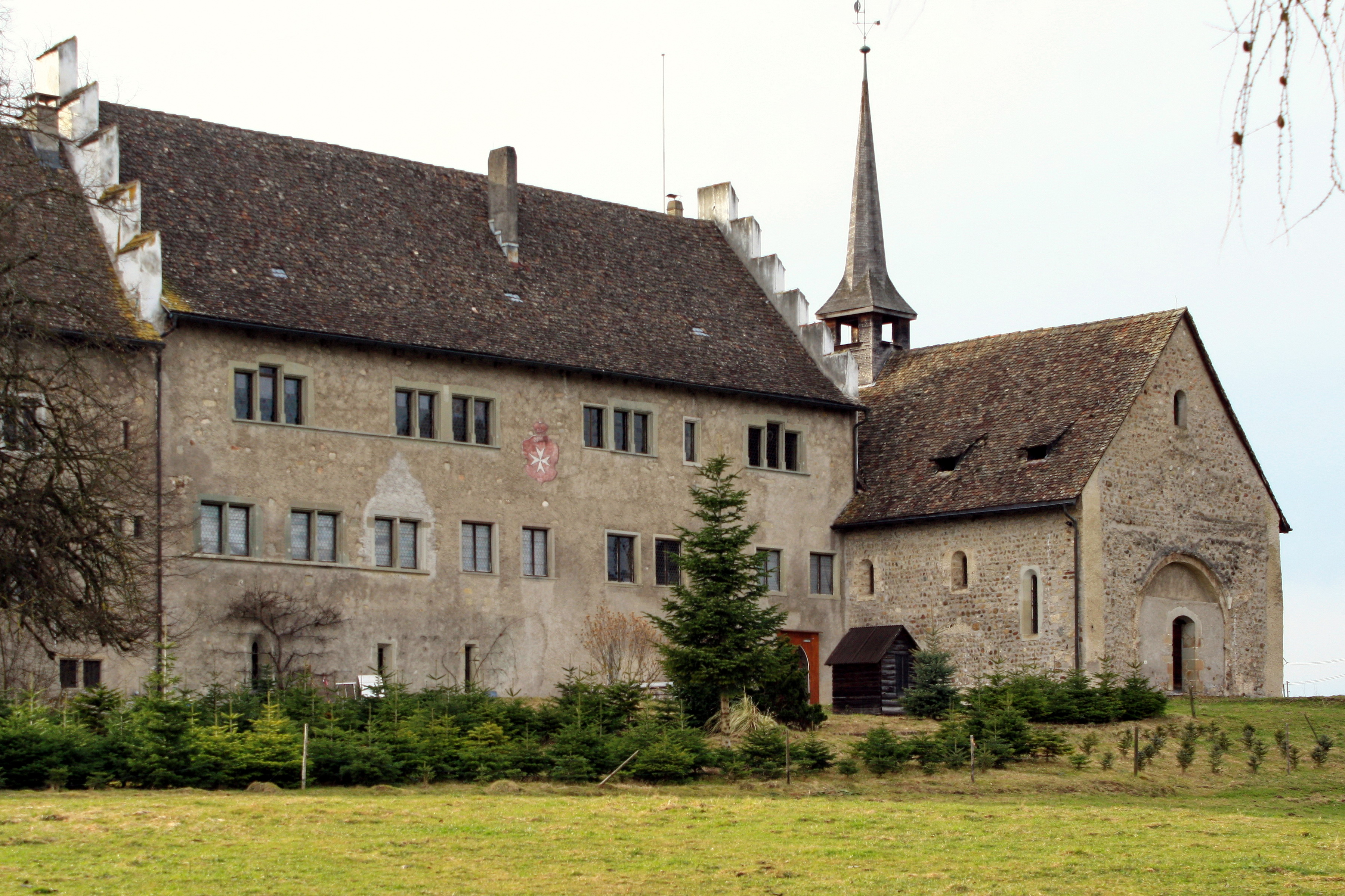 Ritterhaus in Bubikon (Switzerland)